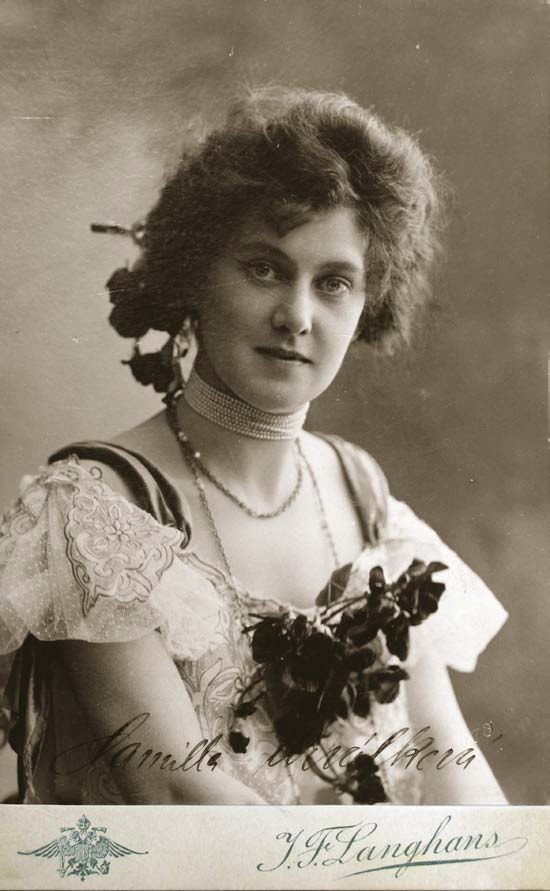 Kamila Urválková, ca. 1900